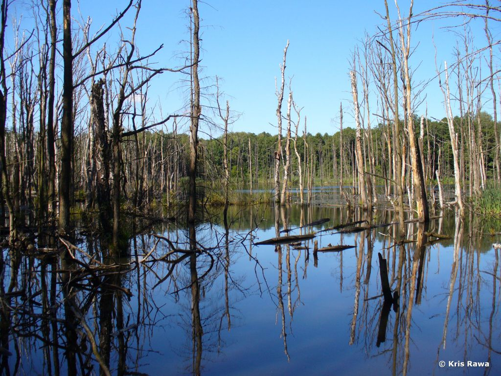 Uroczysko Buczyna